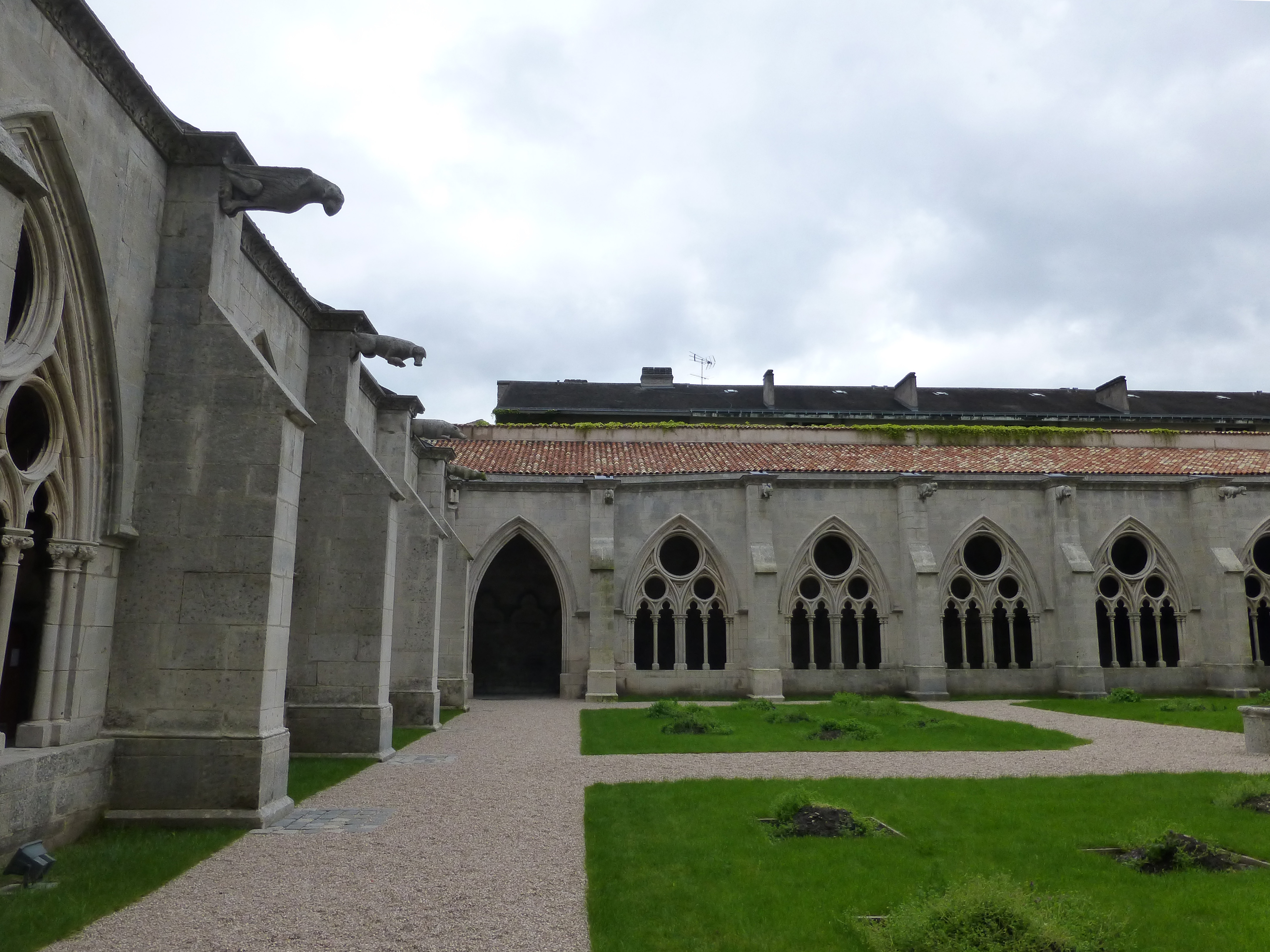 Toul (Meurthe-et-Moselle) : cloître de la cathédrale Saint-Etienne